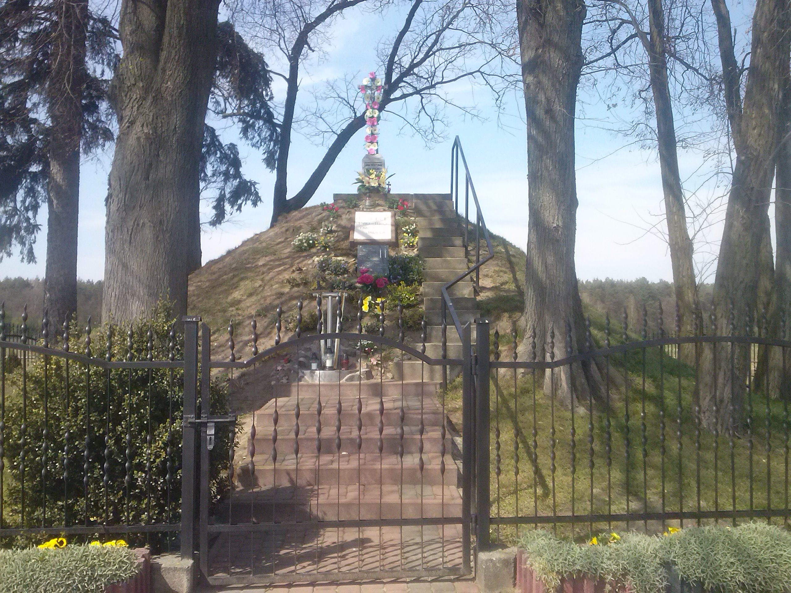 Kopiec poświęcony królowi Władysławowi Jagiele, usypany we wsi Jagieła w 1910 roku, w 500 lecie bitwy pod Grunwaldem